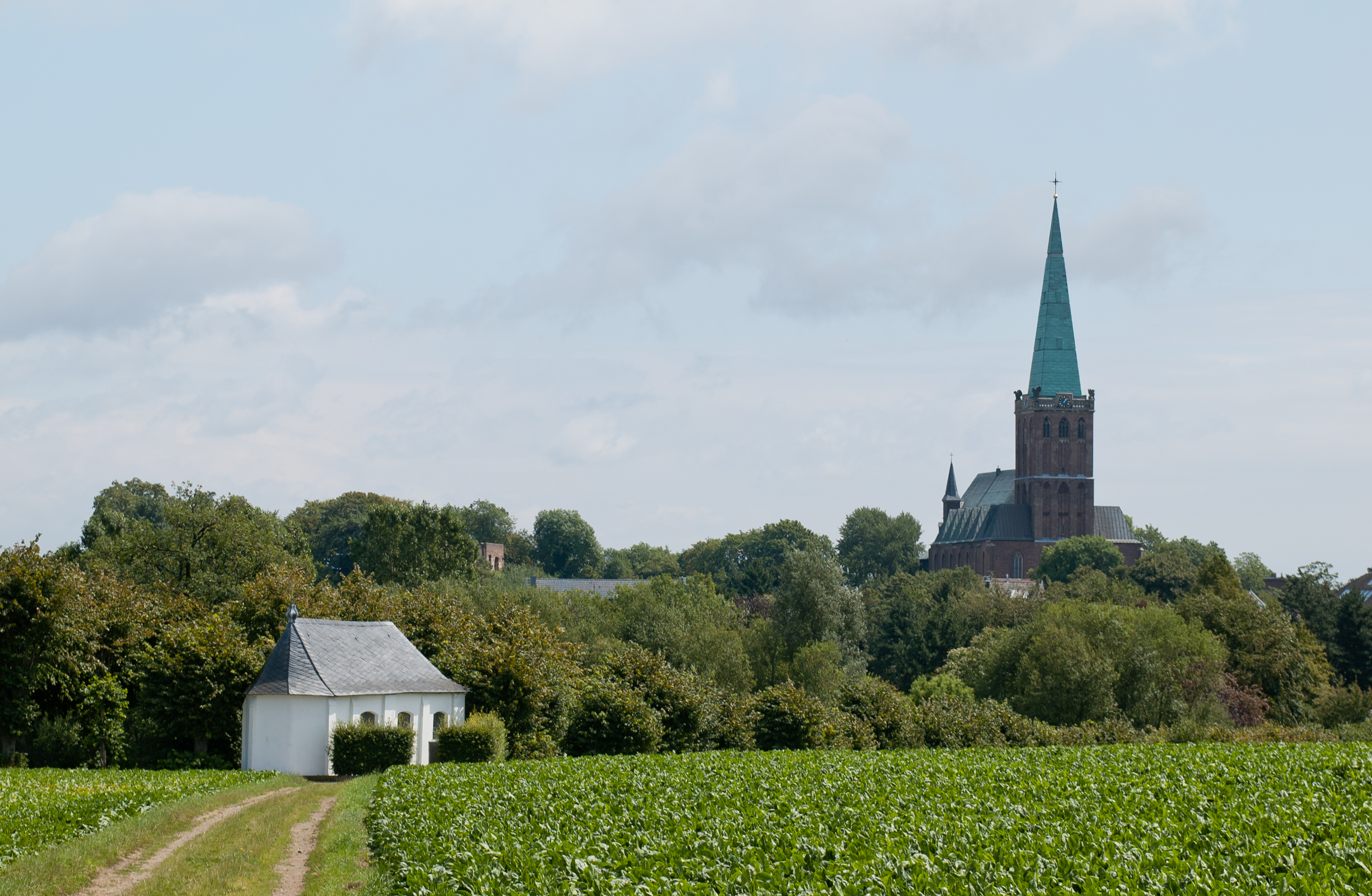 Blick auf St. Gangolf in Heinsberg, Rheinland, und das Schlangenkapellchen am Klosterhof (Vordergrund links) von der Anhöhe am Klosterhof aus.